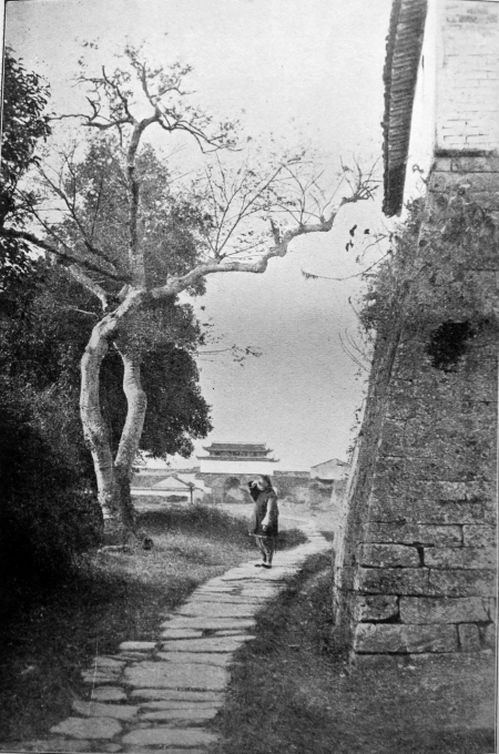 宁波城墙永丰门